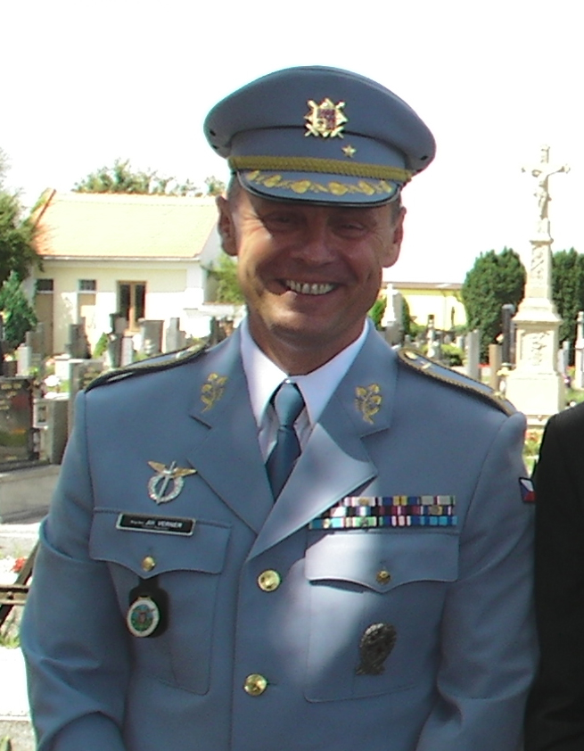 Brigádní generál Jiří Verner na pohřbu Trudie Bryksové. Bohuňovice.